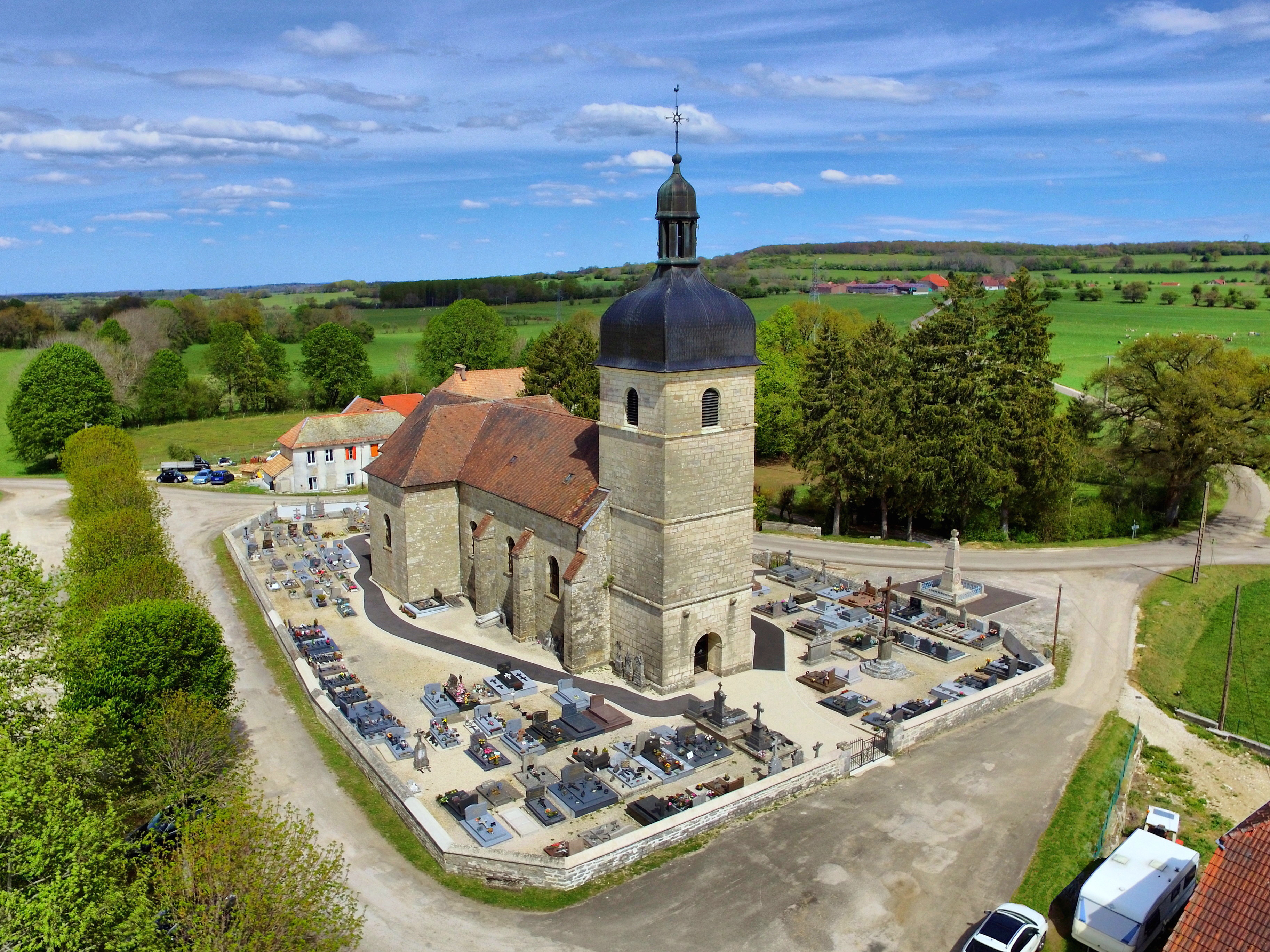 L'église Saint-Hippolyte de Durnes .